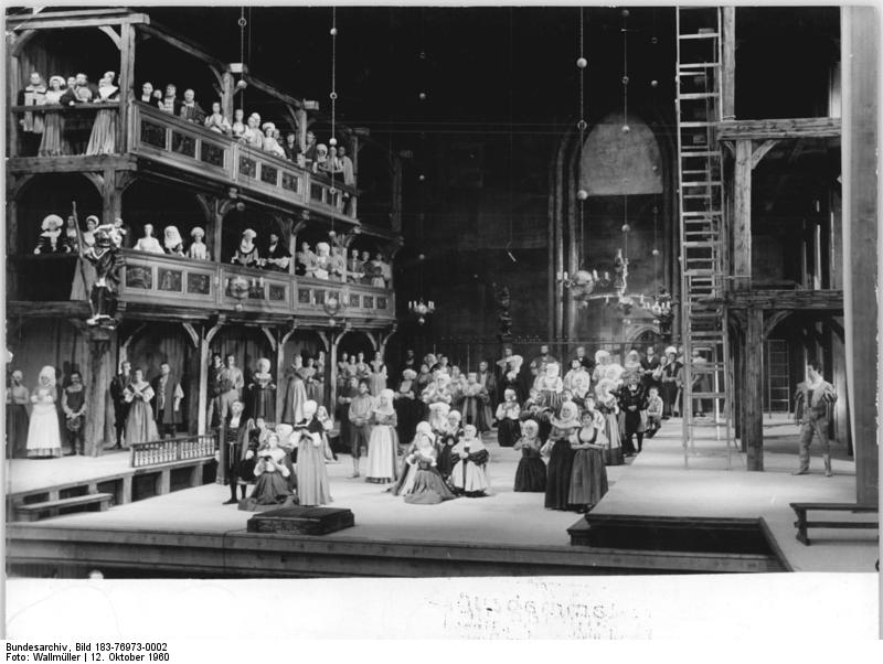 Leipzig, Opernhaus, Aufführung der "Meistersinger" Zentralbild Wallmüller 12.10.1960 Premiere von Wagners "Meistersinger" im neuen Leipziger Opernhaus Ein Theaterereignis ersten Ranges wurde die festlich-glanzvolle erste Premiere im neuen Leipziger Opernhaus am Abend des 8.10.1960: die Aufführung von Richard Wagners "Meistersinger von Nürnberg". Als Symbol und Programm kann die Aufführung der großen Oper des Dichter-Komponisten gelten, der vor 137 Jahren am Leipziger Brühl geboren wurde, sind doch die "Meistersinger" die künstlerisch gestaltete Forderung Wagners nach einer festen Verwurzelung des Kunstschaffens im Leben des Volkes, nach Anerkennung des Volkes als höchste Autorität in Fragen der Kunst. UBz: Der Choral aus dem I. Akt der Oper.